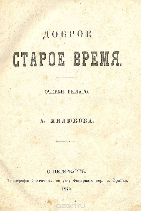 А. П. Милюков "Доброе старое время", 1872